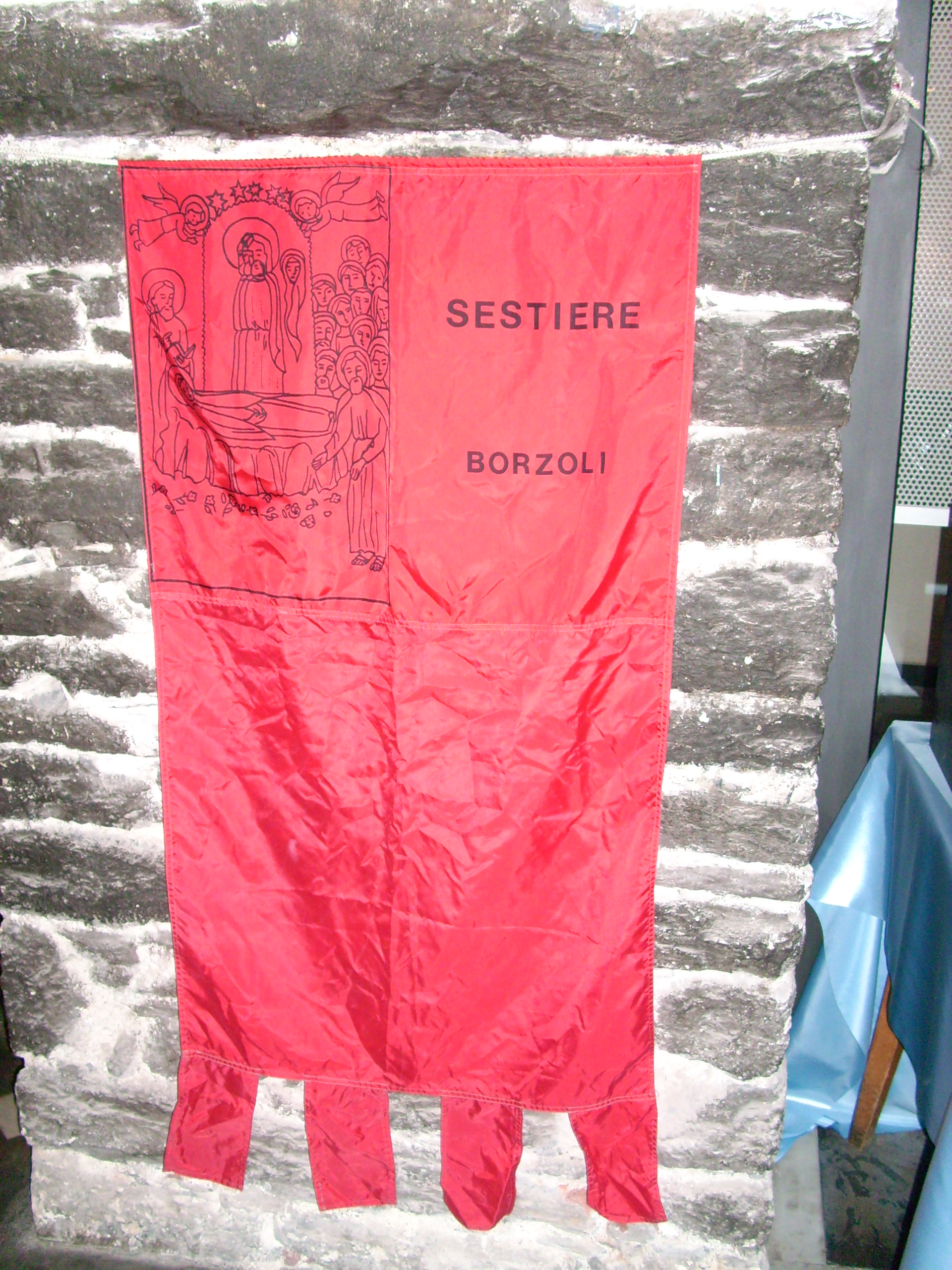 Bandiera del Sestiere Borzoli di Rapallo, Liguria, Italia